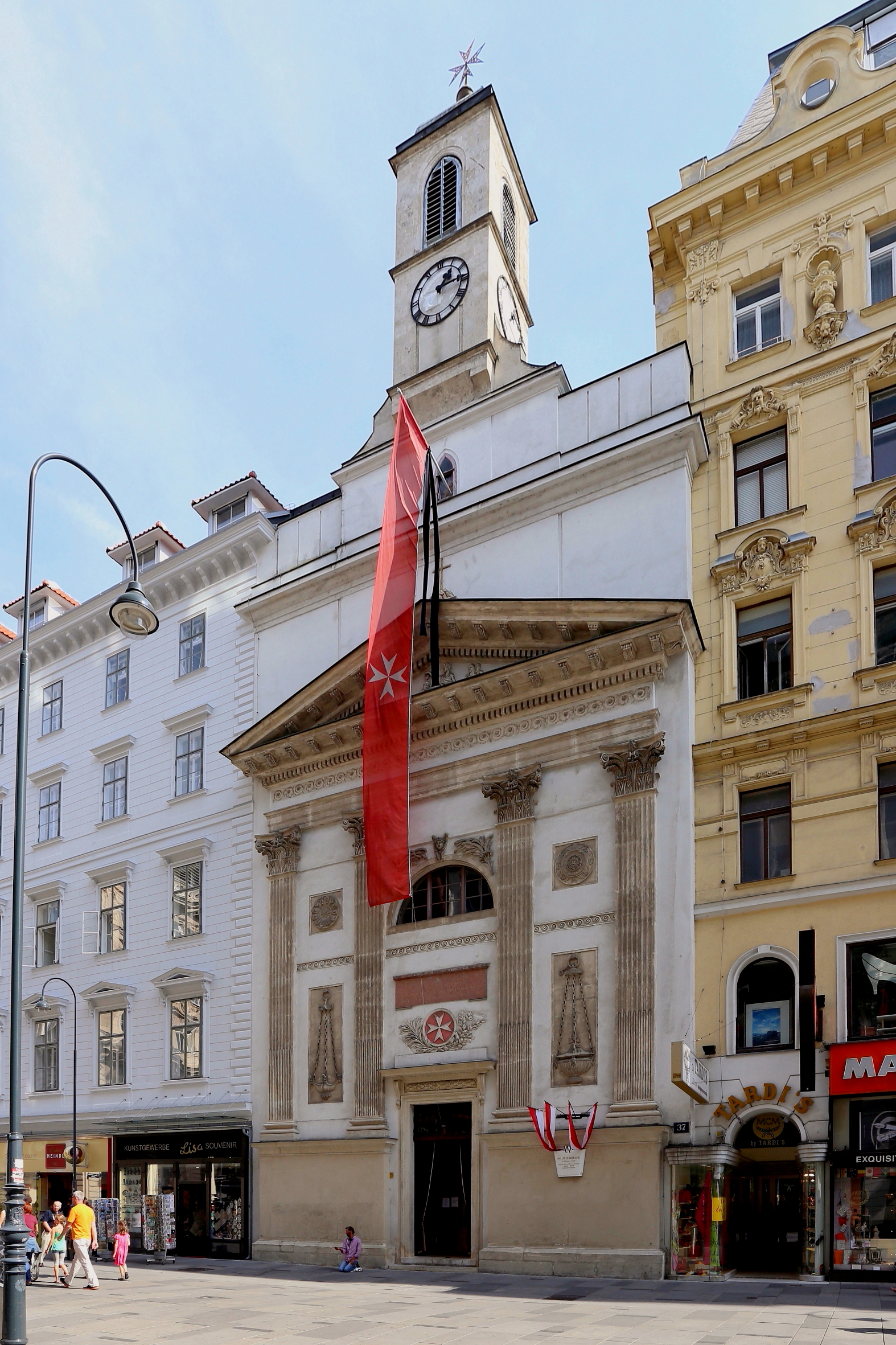 Die Malteserkirche in der Kärntner Straße in Wien mit einem osteuropäischen Bettlertouristen davor. Der einschiffige Sakralbau wurde Mitte des 15. Jahrhunderts errichtet. Zur Barockzeit wurde die Kirche dem Zeitgeschmack entsprechend umgebaut. Eine weitere Umgestaltung erfolgte Anfang des 19. Jahrhunderts. Dabei erhielt die Kirche eine Fassade im Empirestil mit korinthischen Pilastern und einem kleinen Turm. Die Inneneinrichtung wurde ebenfalls teilweise neu gestaltet wie beispielsweise die Kanzel.